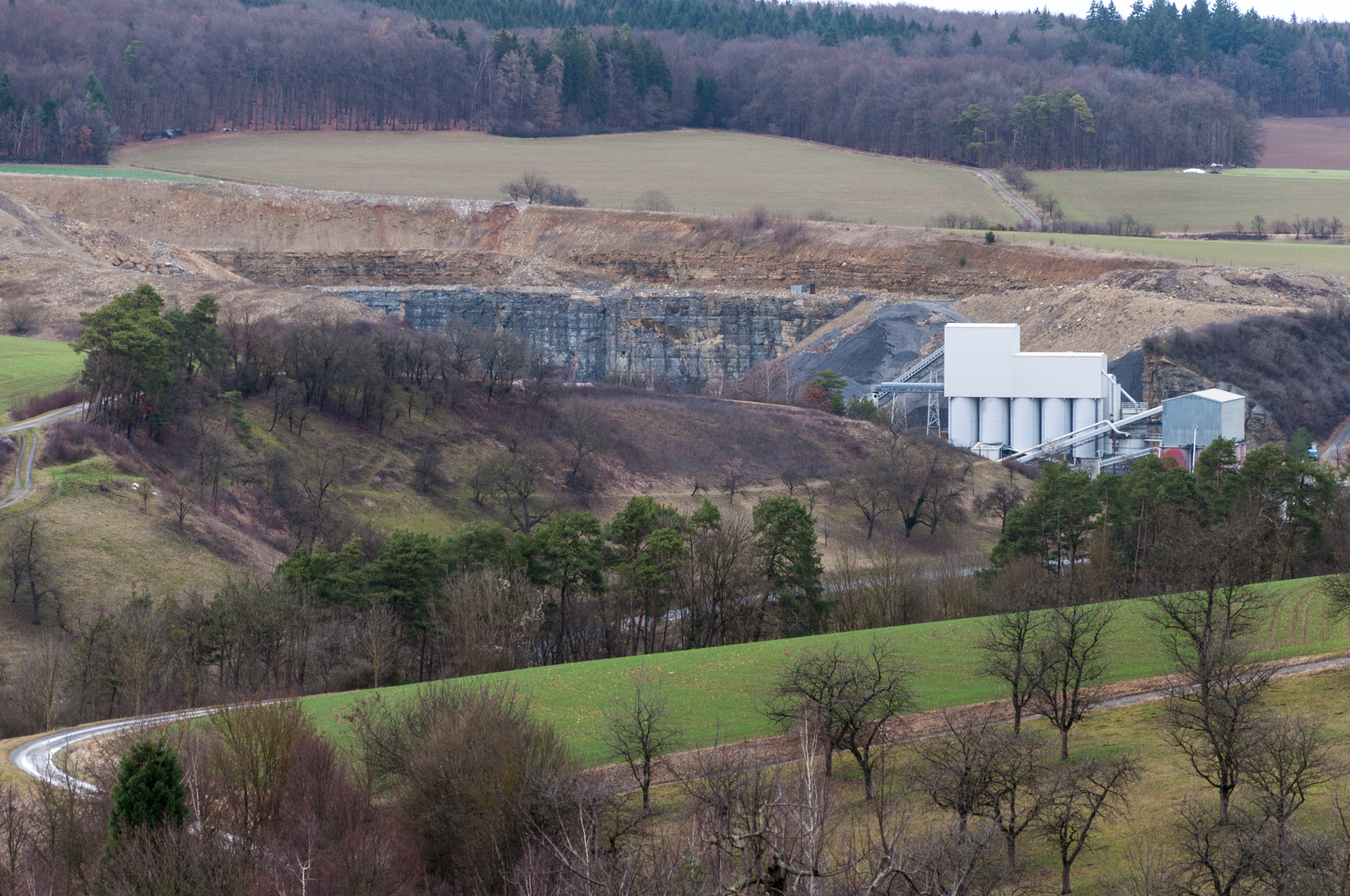 Muschelkalkbruch im rechten Hanggewann Wanzenäcker des Laibachtals etwas nördlich des Dörzbacher Ortsteils Laibach. Im Hintergrund darüber die bewaldete Schwarze Platte.